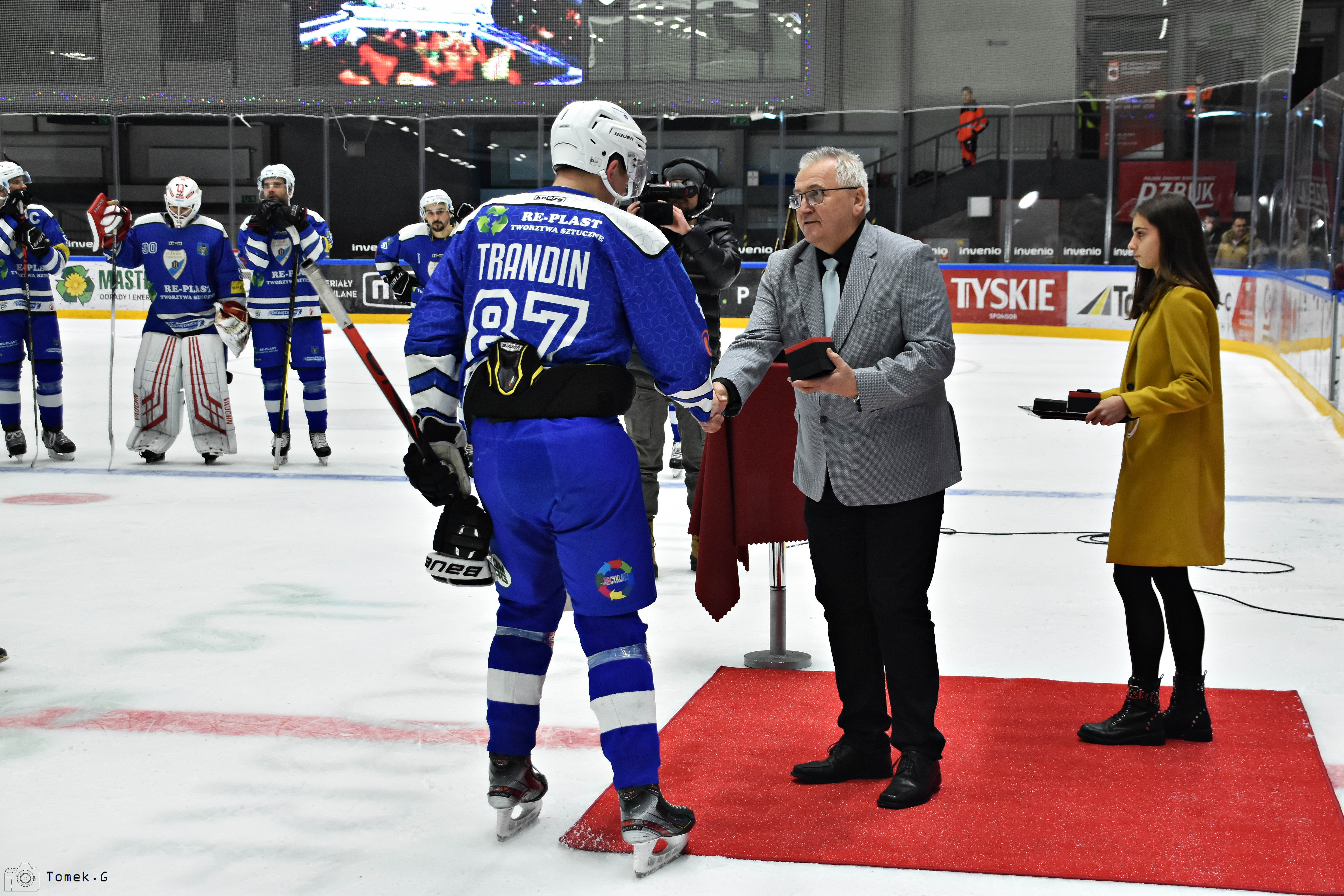 Finał Pucharu Polski w Hokeju na Lodzie 2019/2020